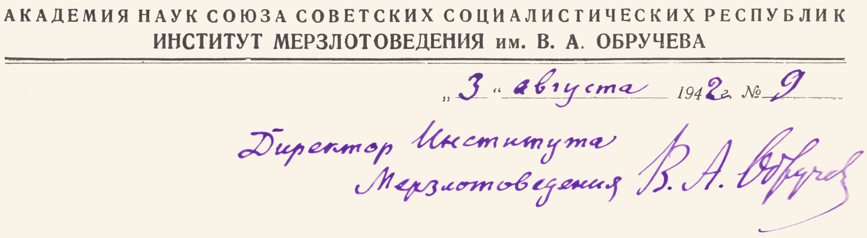 Институт мерзлотоведения имени В. А. Обручева АН СССР Подпись директора - В. А. Обручева, 1942 год.